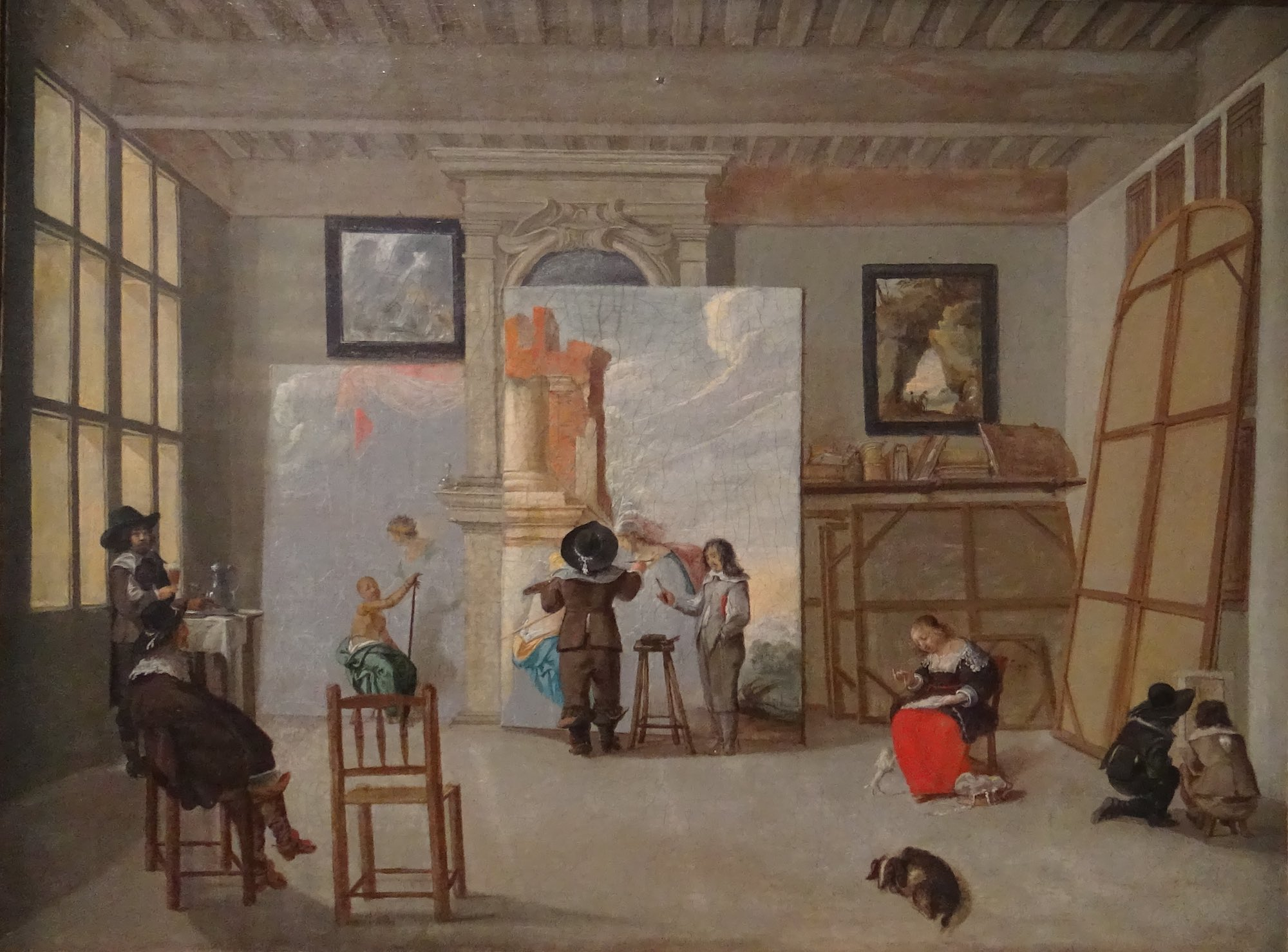 Huile sur toile - 51 x 68 cm Bruxelles, Musée d’Ixelles Photo : Didier Rykner